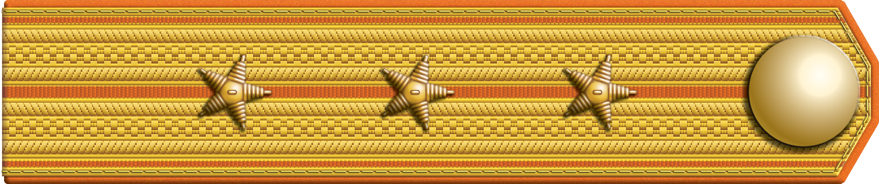 Погон: становой пристав уездной полиции, коллежский секретарь, 1884–1917 гг.